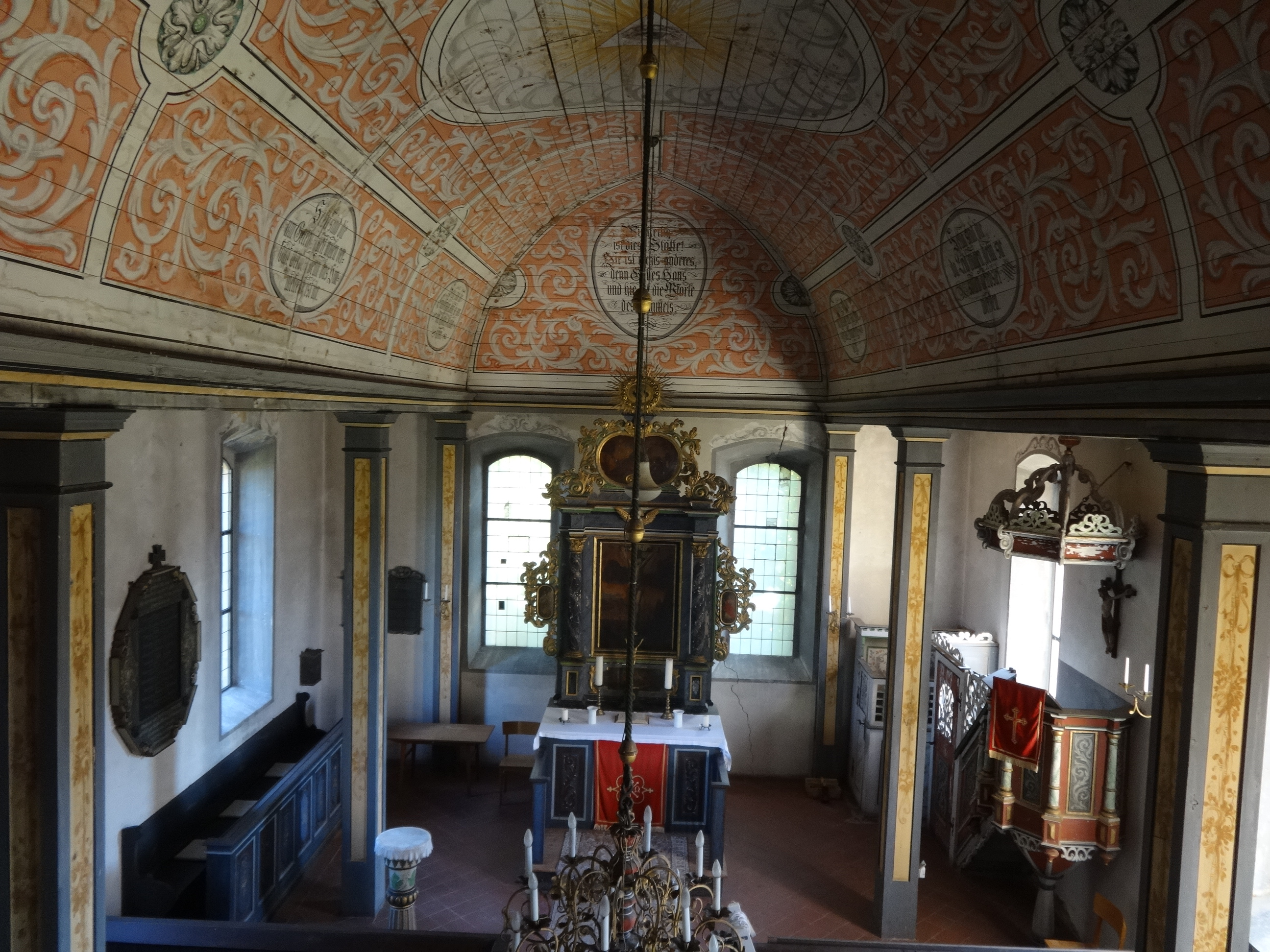 Die Dorfkirche in Niendorf, Gemeinde Ihlow (Fläming) wurde im 18. Jahrhundert auf dem Sockel eines Vorgängerbaus errichtet. 1908 wurde sie von der Kirchengemeinde neobarock überformt. Im Innern befinden sich unter anderem ein Altar sowie eine Kanzel aus dem 18. Jahrhundert.